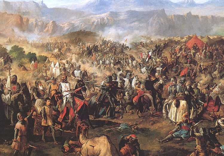 Esta obra, que fue depositada por el Museo del Prado en 1878 en el Palacio del Senado de España, representa la batalla de las Navas de Tolosa, que se libró el día 16 de Julio de 1212 en las cercanías del municipio jienense de Santa Elena. Y es conocida también como la batalla de los tres reyes, ya que en ella combatieron los monarcas Alfonso VIII de Castilla, Pedro II de Aragón y Sancho VII de Navarra.